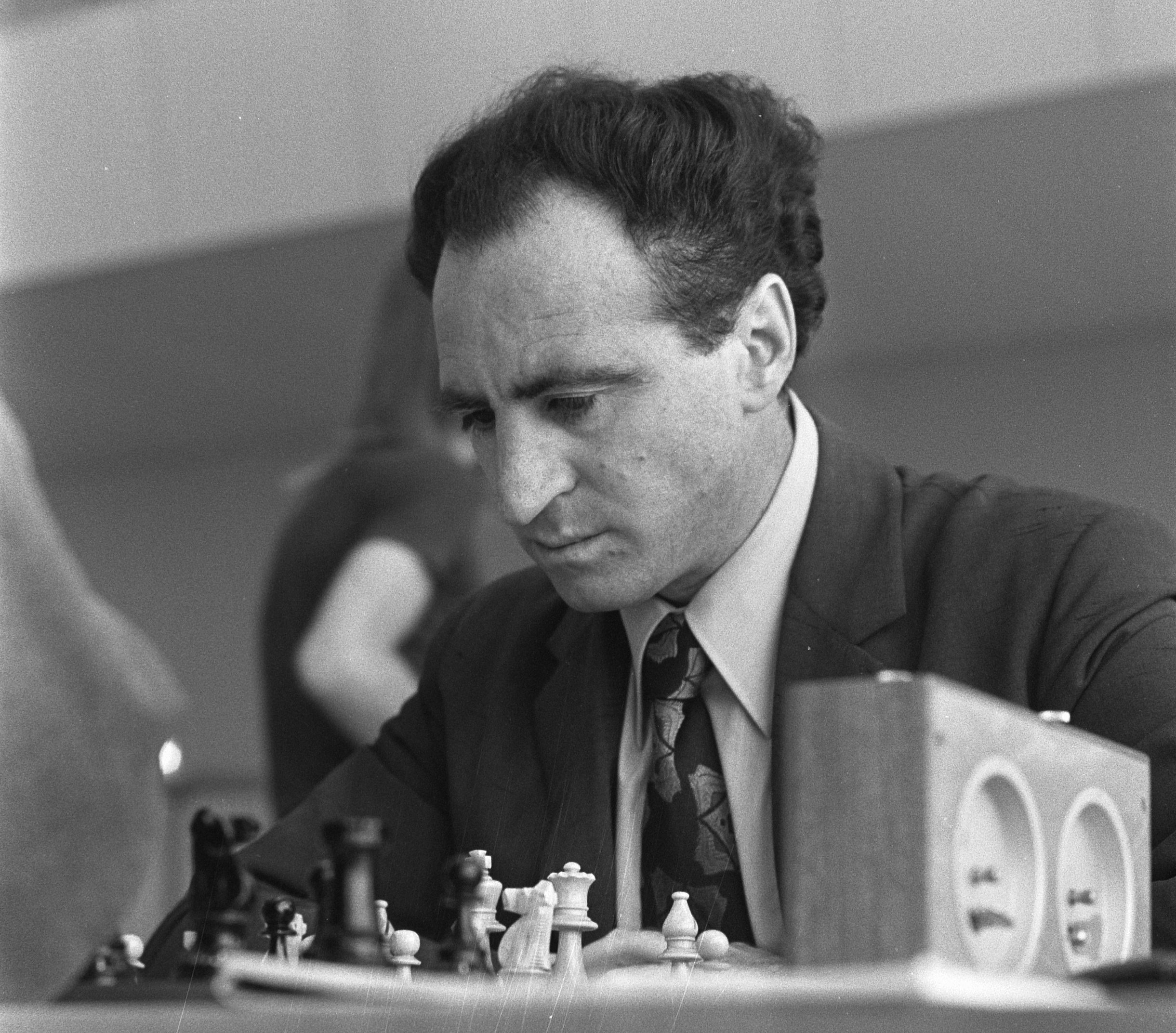 Lev Polugaevsky